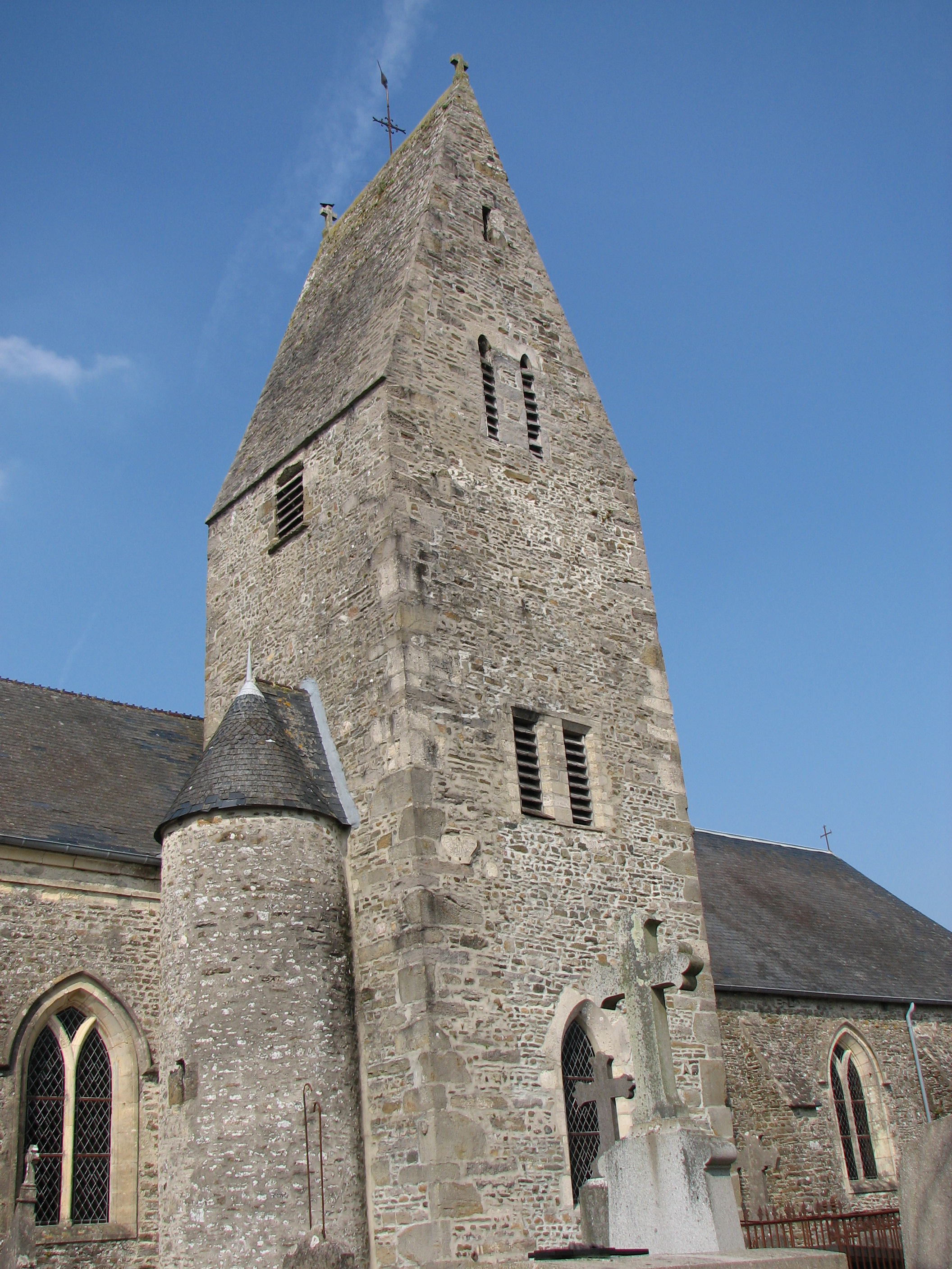 Clocher de l'église de Denneville, Manche, NormandieDenneville churche bell tower, Normandy